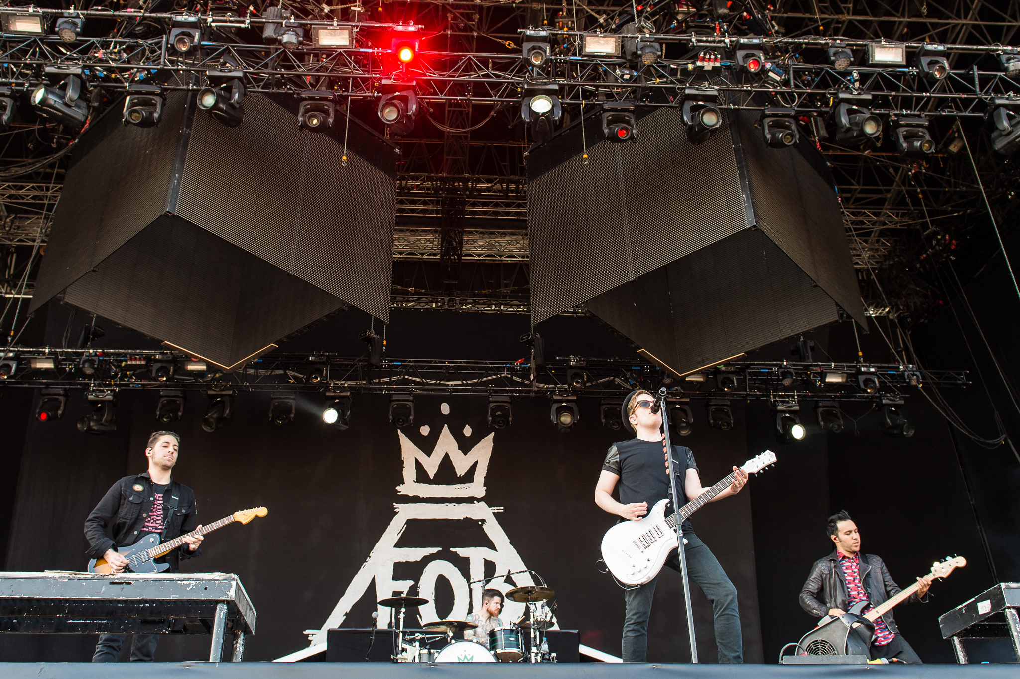 ARGO-Konzerte,Andy Hurley,Centerstage,Fall Out Boy,Joe Trohman,Konzert,Livekonzert,Livemusik,Musik,Patrick Stump,Pete Wentz,RiP,Rock im Park 2014